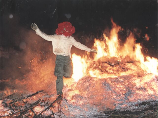 Johanisfeuer in Sulzbach im Oberelsass